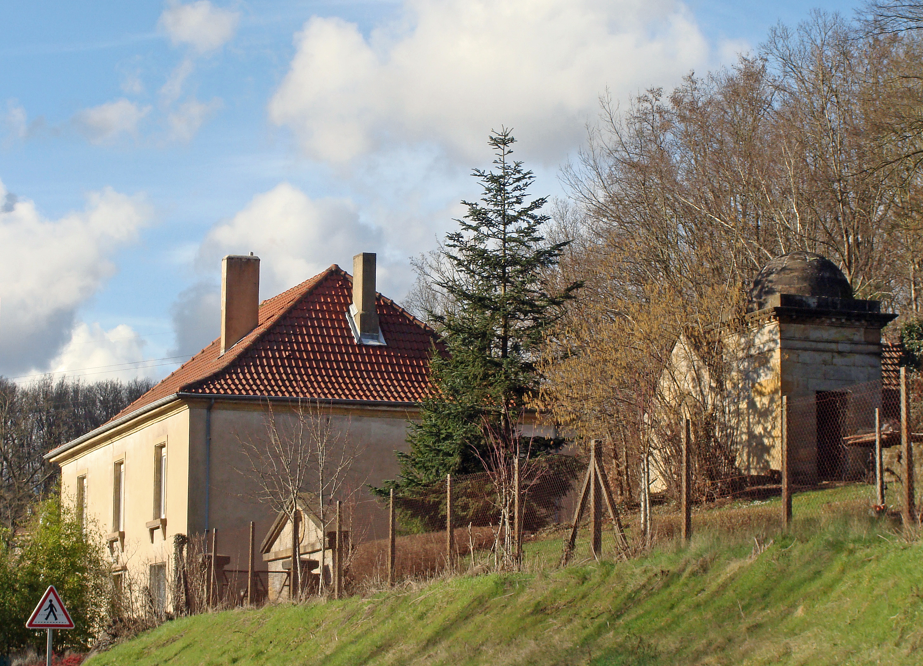 Villa-Louise et son petit temple (XVIIIe) à Freyming-Merlebach, qui avait appartenu à la riche famille des Mangay. Elle est située dans le quartier Sainte-Fontaine. Philippe-Louis Mangay (1782-1842) était avocat à la cour royale de Metz. Il est inhumé dans une tombe de forme pyramidale, square Saint-Maurice à Freyming-Merlebach. Photo prise le 17 février 2014.